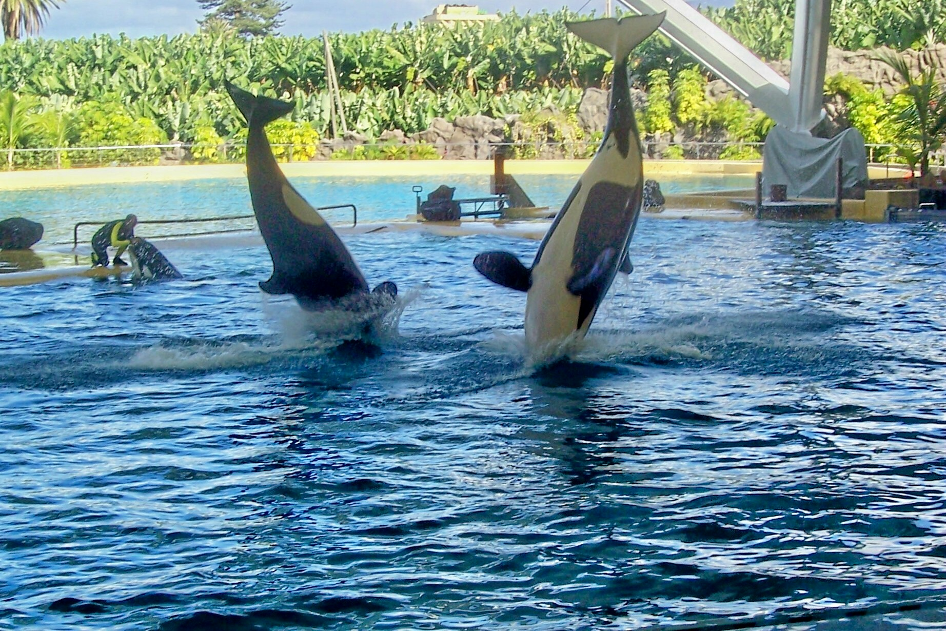 Dressierte Orka-Wale im Loro Parque